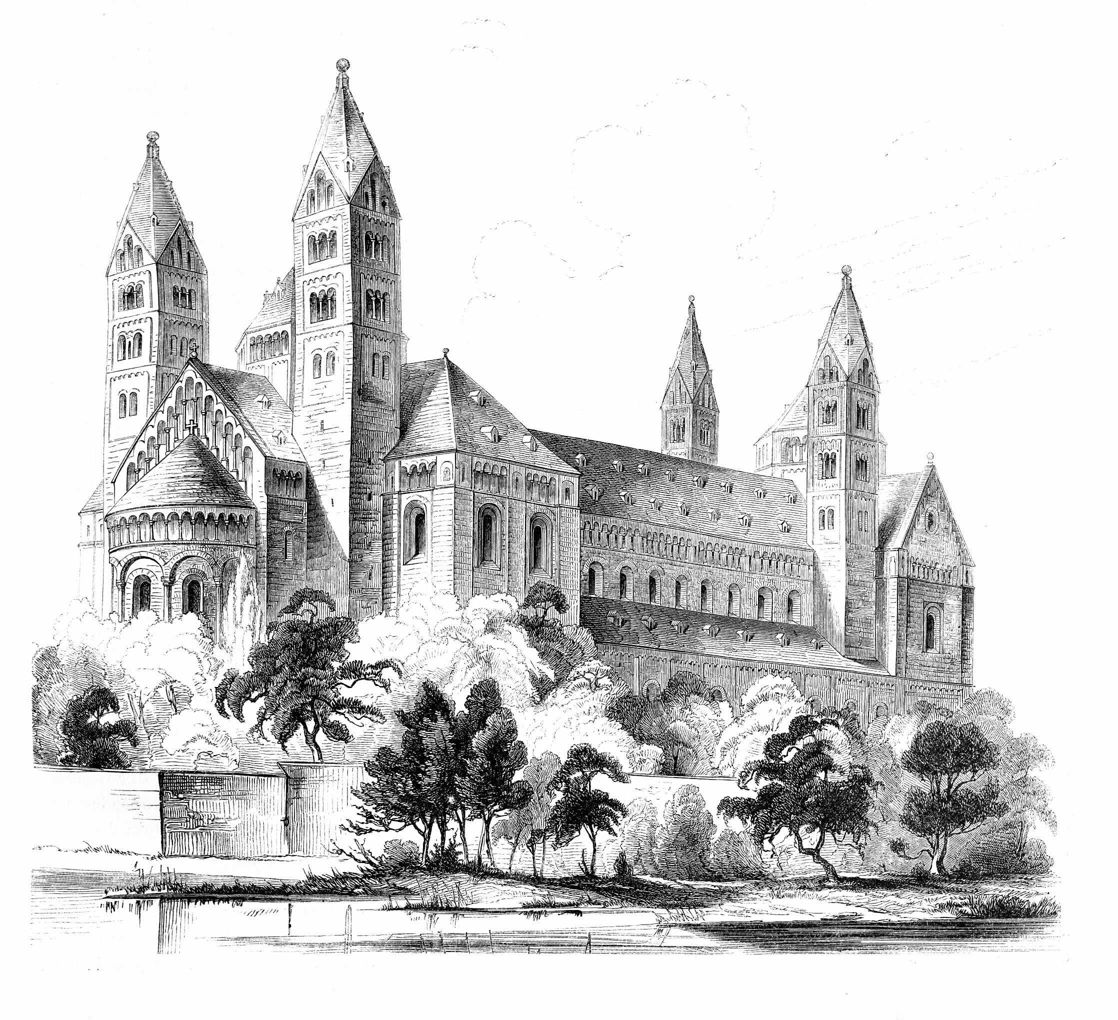 Bild aus den Mittheilungen der kaiserl. königl. Central-Commission zur Erforschung und Erhaltung der Baudenkmale Band 3, 1858. Die inhaltliche Zuordnung entsprechend des in derselben Kategorie befindlichen Artkikels (PDF-Dokument)